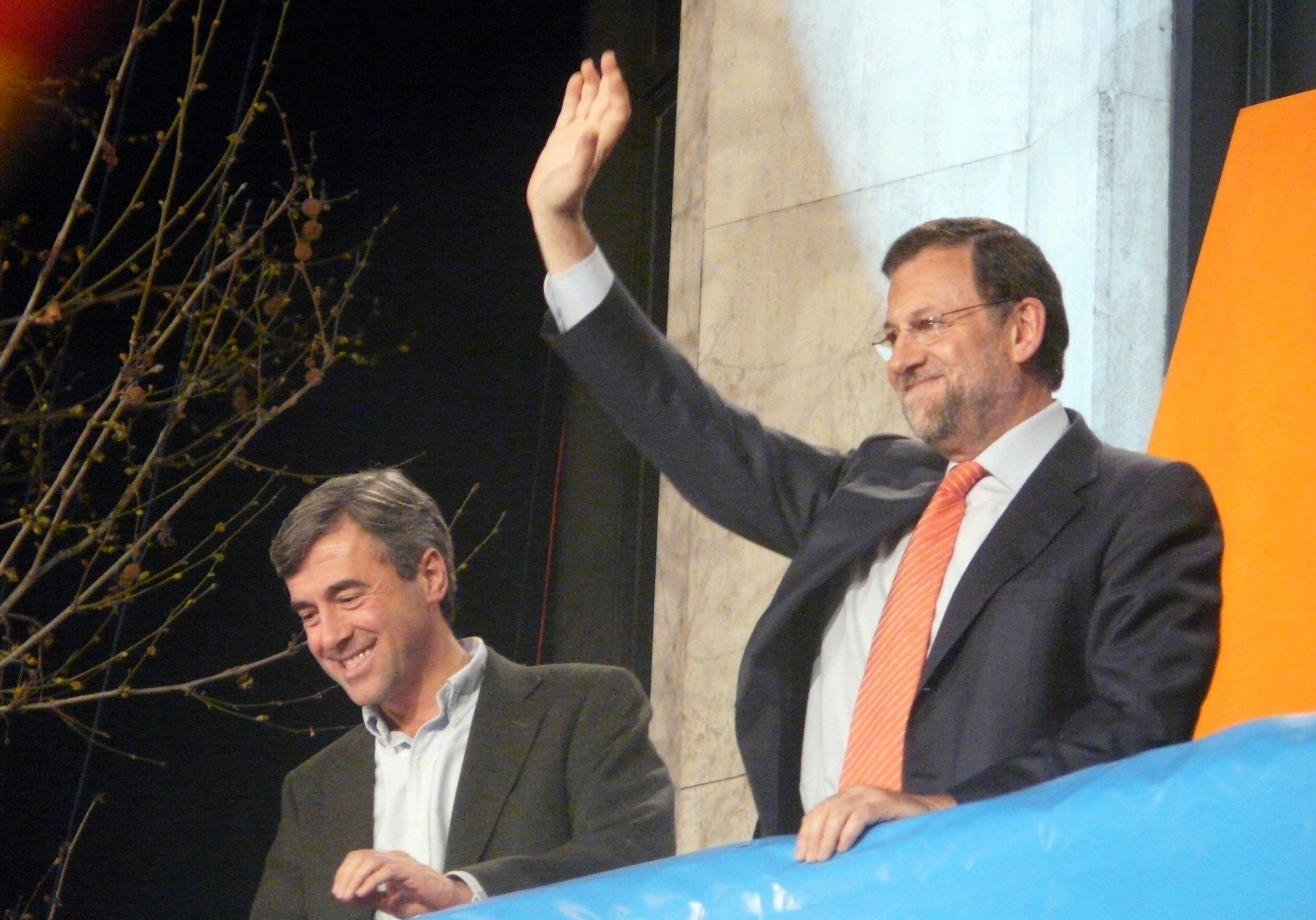 En la calle Génova, Madrid, la noche del 9 de marzo.